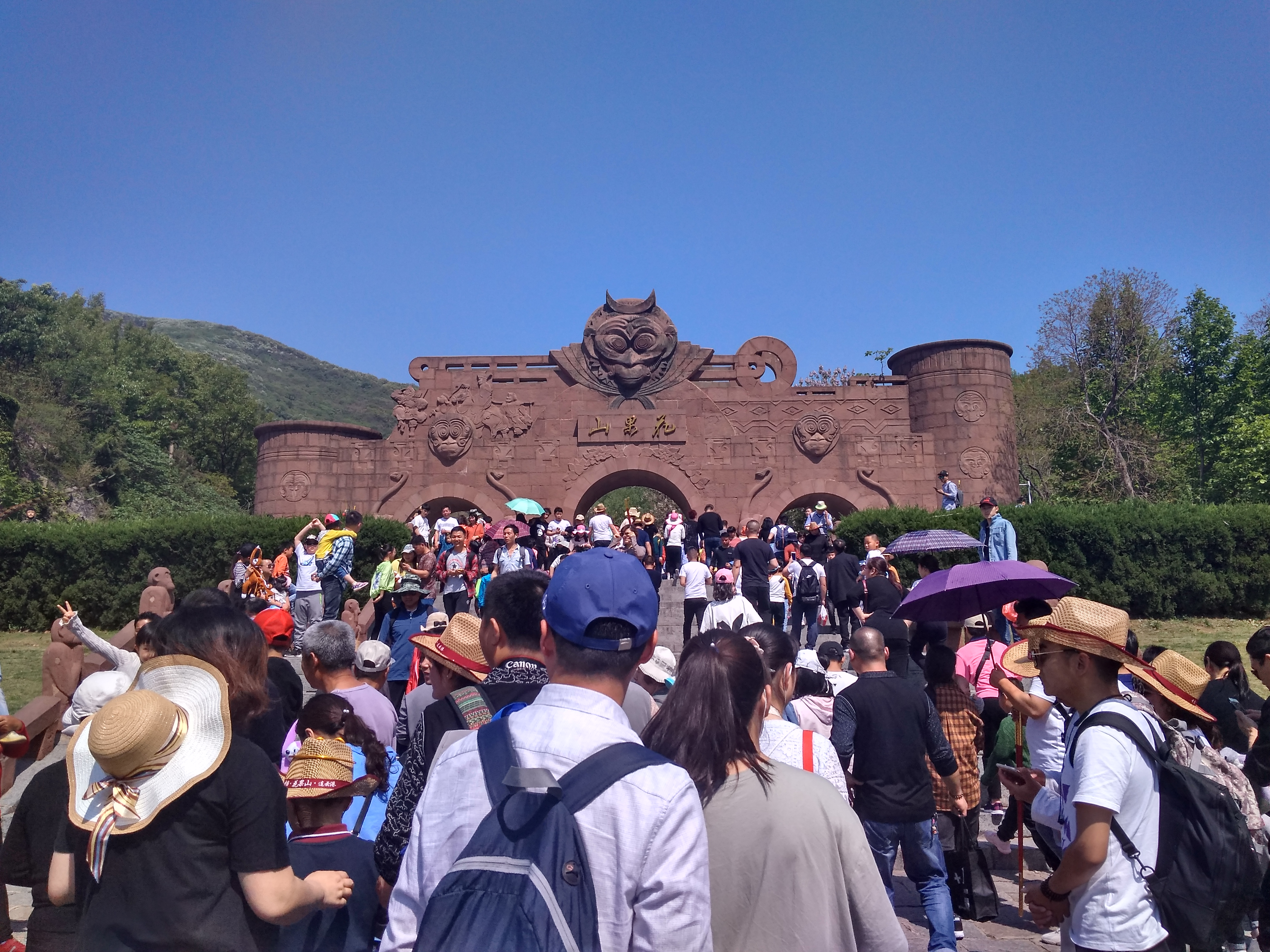 连云港花果山山门